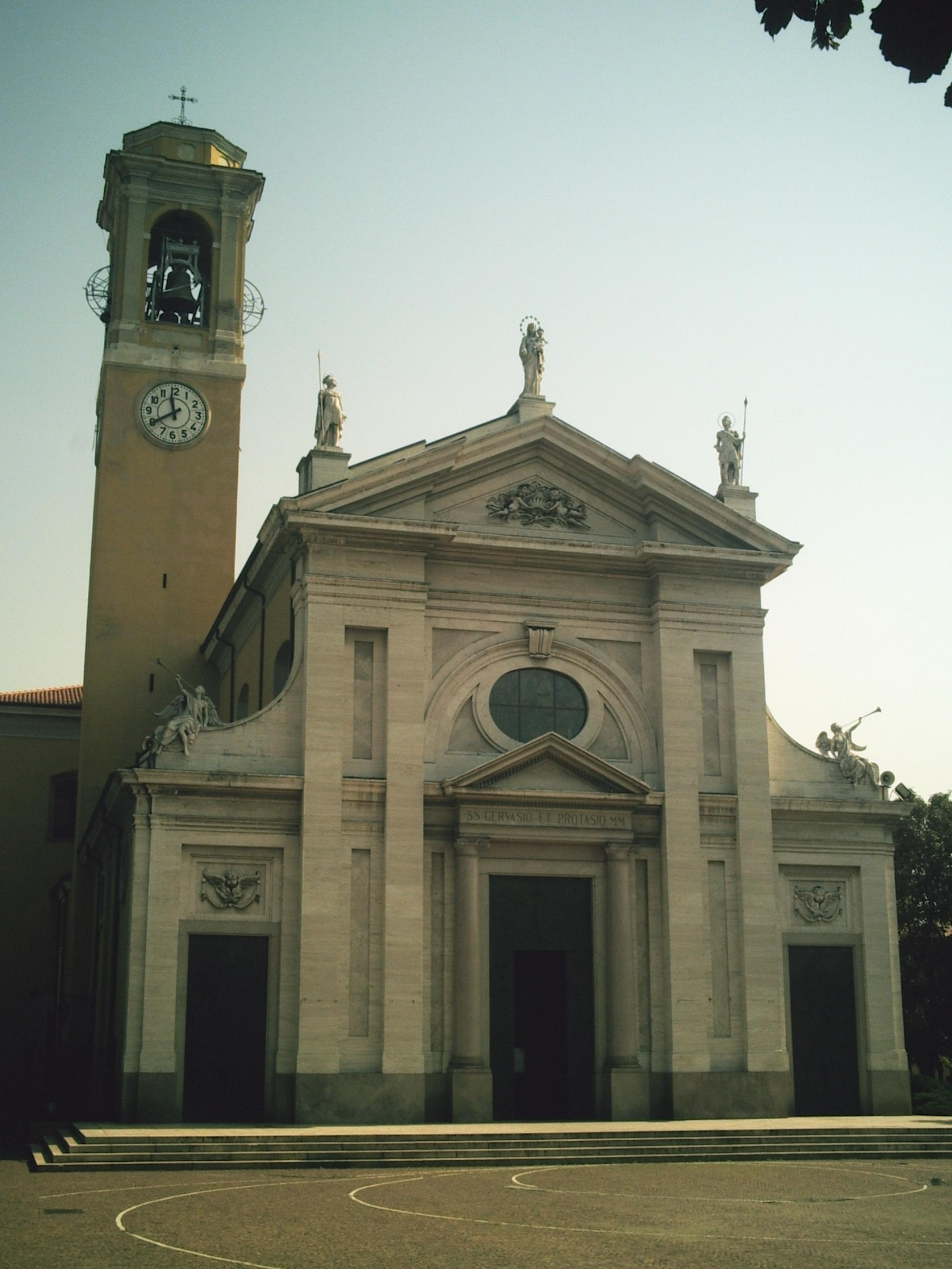 Facciata della Chiesa Prepositurale dei S.S. Gervaso e Protaso in Parabiago (MI), progettata da Giuseppe Piermarini.